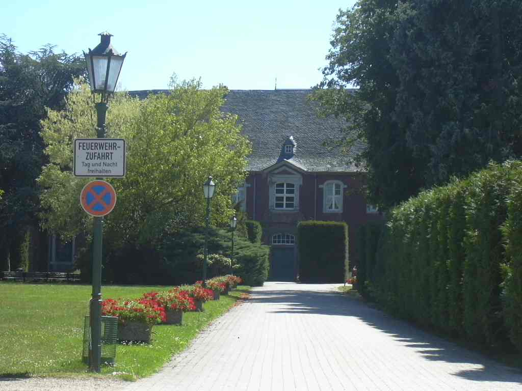 Füssenich